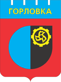 Герб Горловки (СССР)